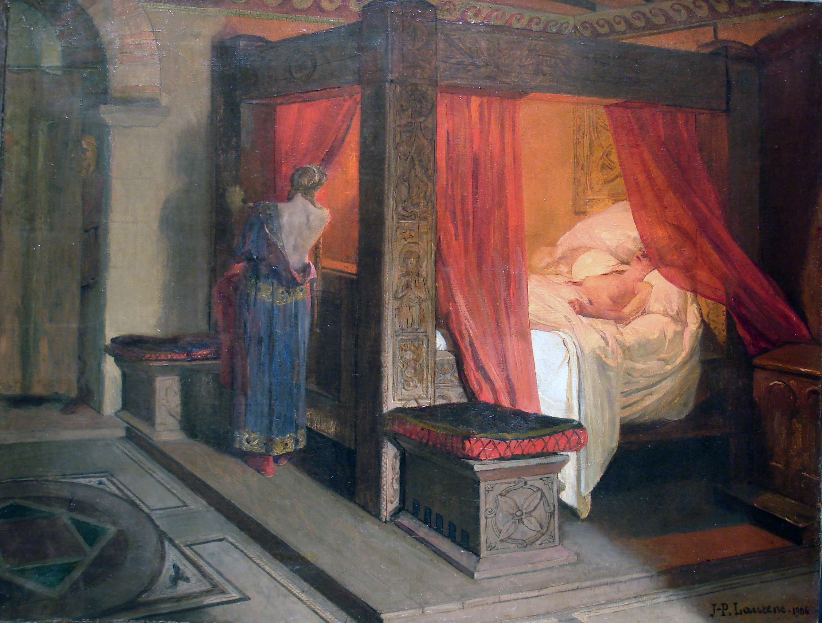 Jean-Paul Laurens, La muerte de Galeswinthe.1906. 65,5 x 85 cm, con marco: 83 x 103 x 5,5 x 9 cm, óleo sobre tela. Inv. 2103.